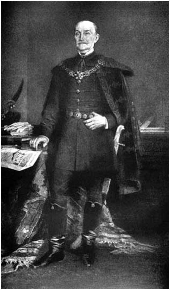 Saárdi Somssich Pál politikus, a képviselőház alelnöke, majd elnöke.